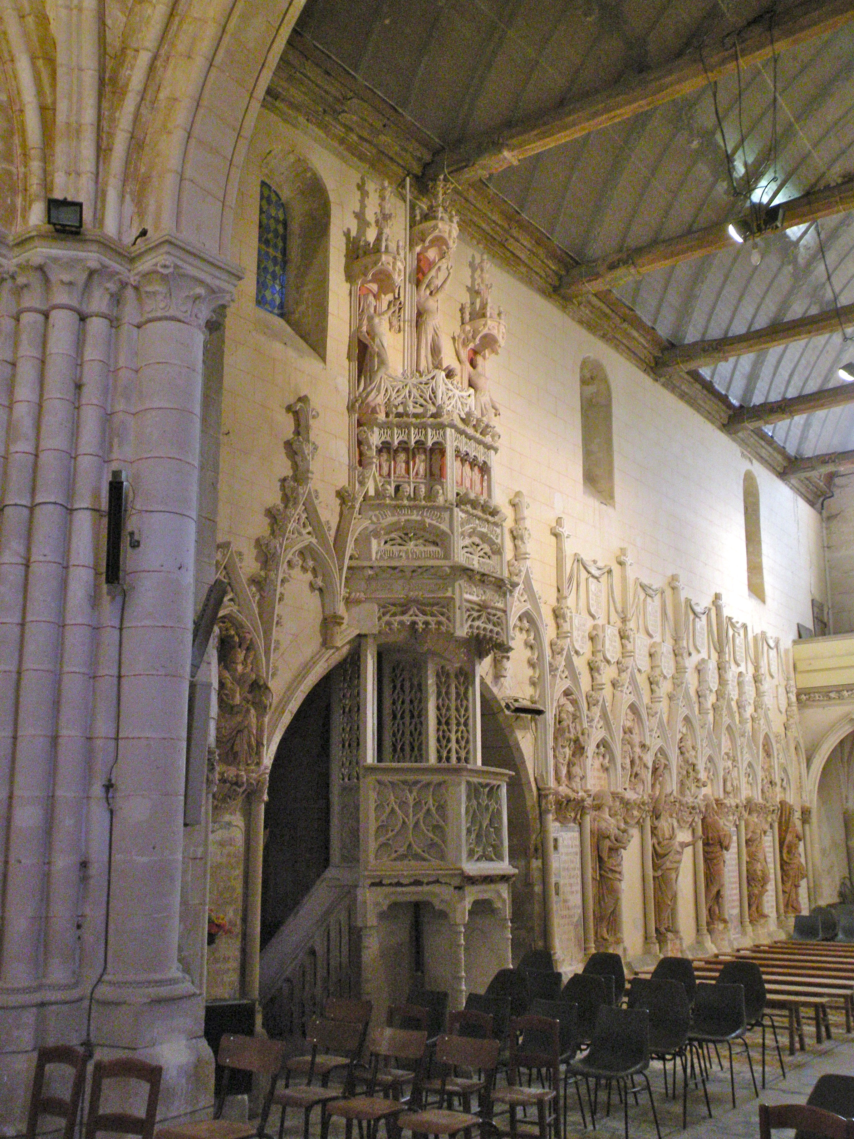 Croisée du transept, vue vers le sud-ouest sur le mur sud de la nef et la chaire à prêcher.